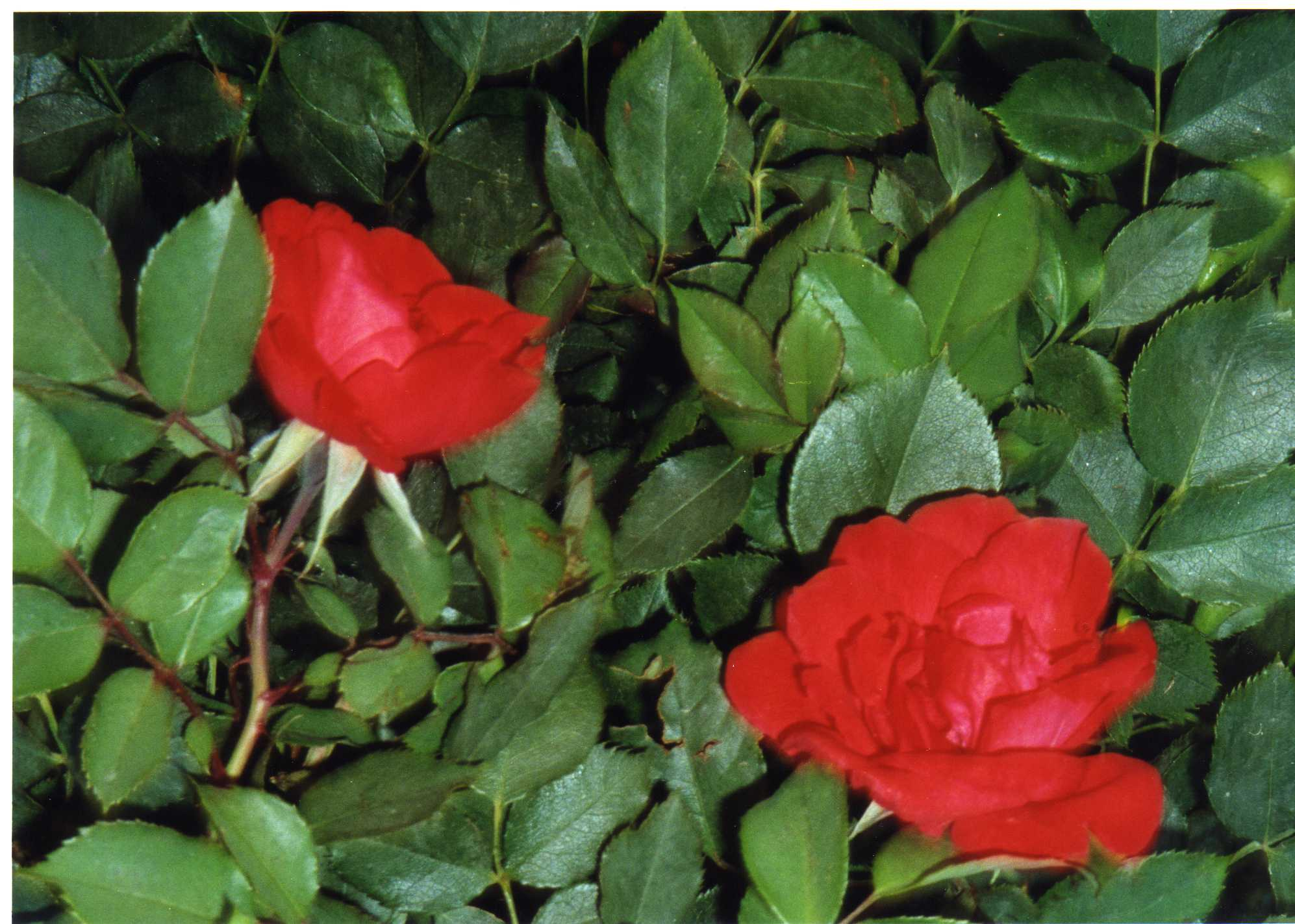 Rosas rojas en San Carlos de Bariloche